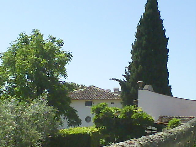 La Villa Medicea della Topaia vist da est